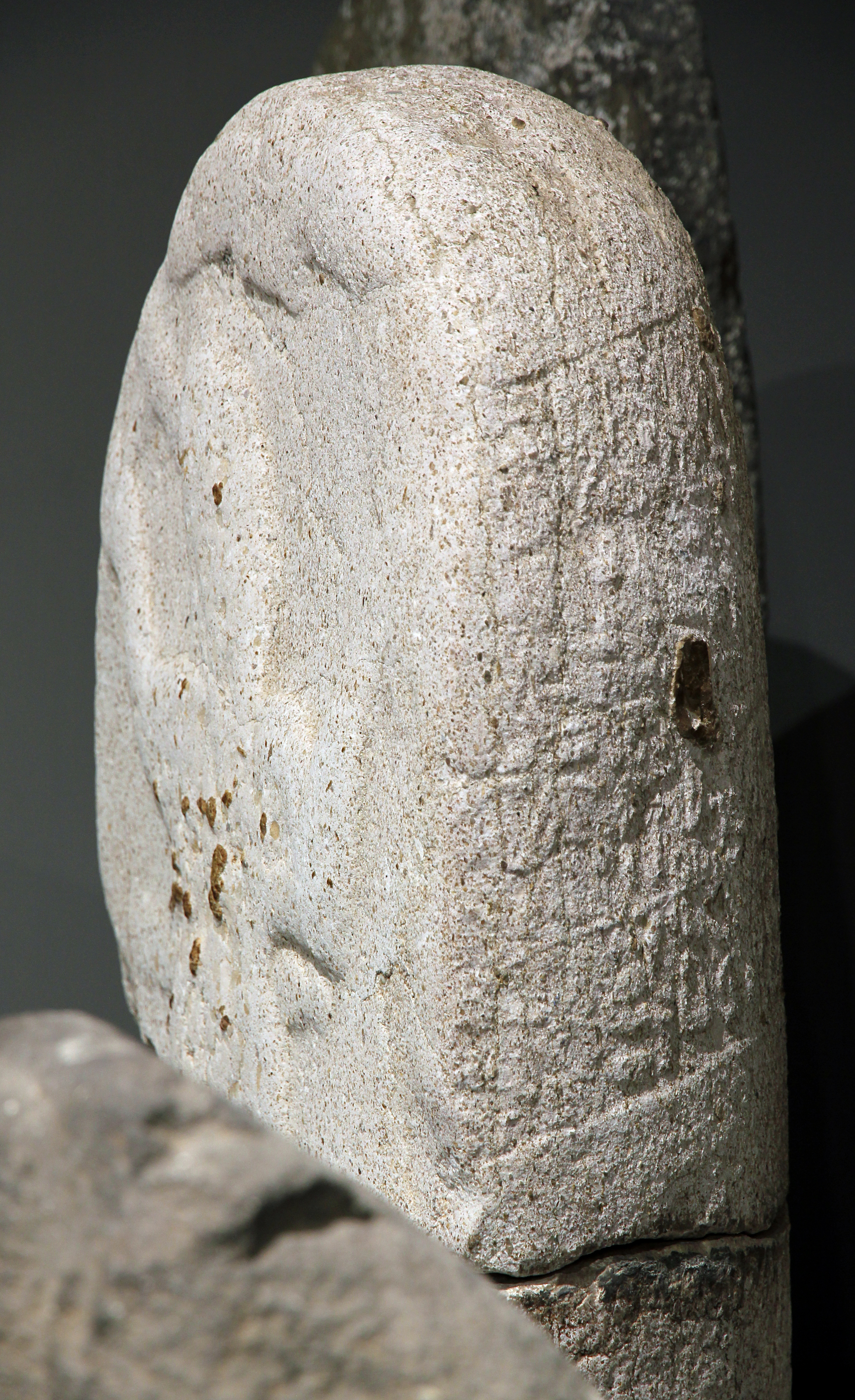 Archäologisches Museum Adana, Südtürkei, späthethitische Stele Maraş B/5